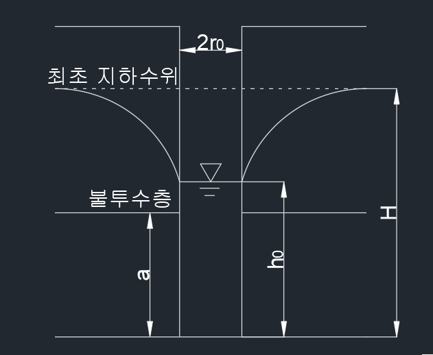 굴착정 설명 그림